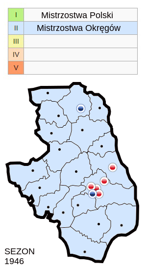 Jagiellonia w sezonie 1946 - mapa klubów